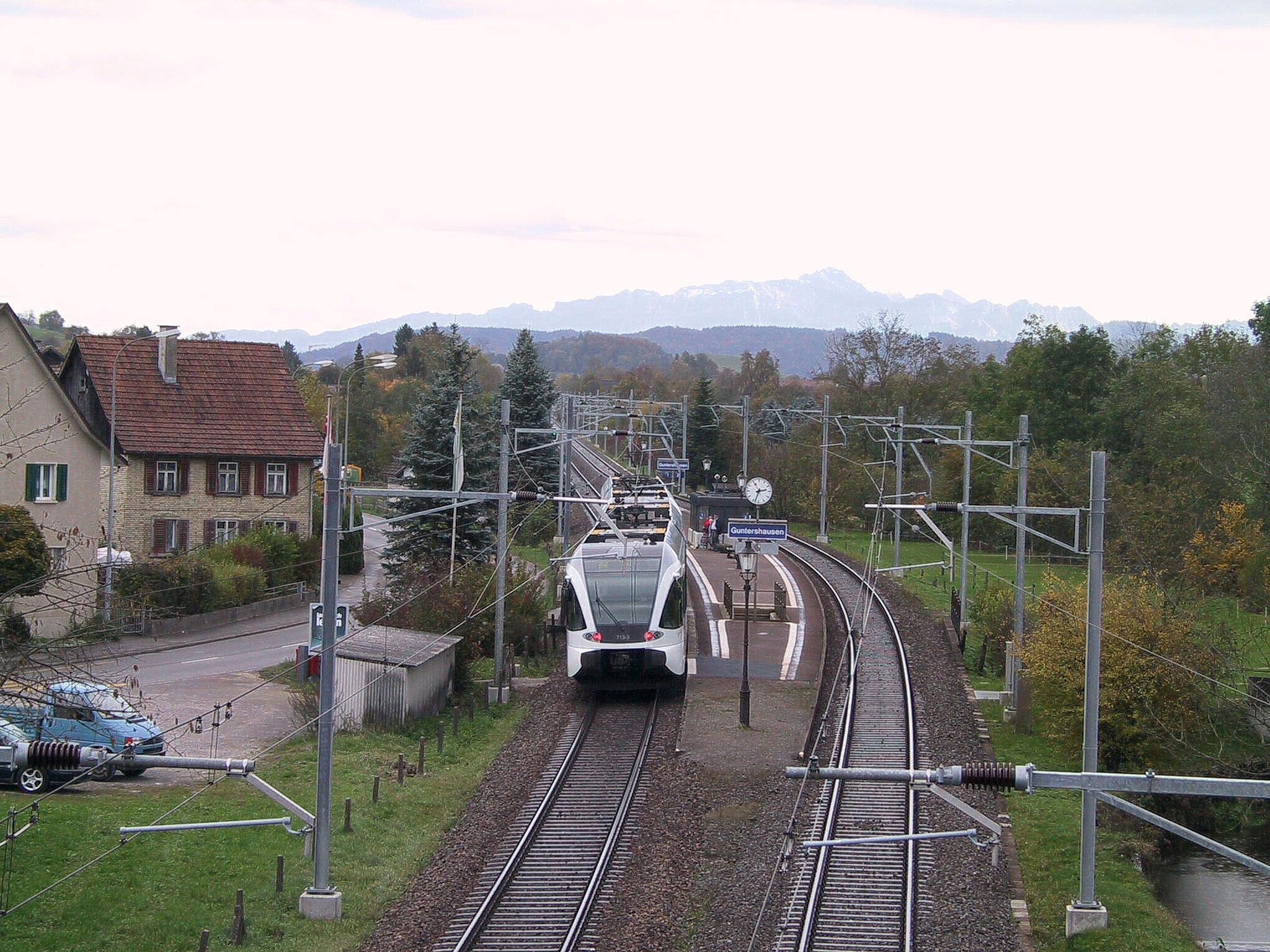 Bahnhof Guntershausen. Neuer Triebwagen der Turbo AG, Blick gegen den Säntis, 2502 m.ü.M. Kamera: Canon PowerShot G1